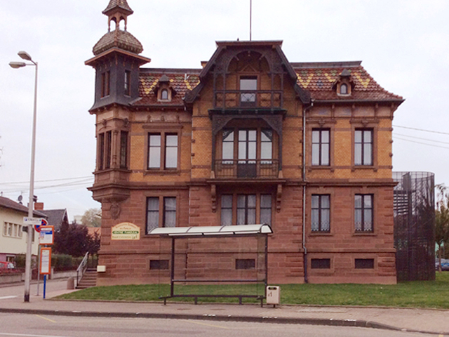 La villa des sapins à Wasselonne, également appelée Bandeschlessel, après avoir été un restaurant est devenue la maison des jeunes dans les années 60 et qui aujourd’hui abrite l’Association Générale des Familles. .